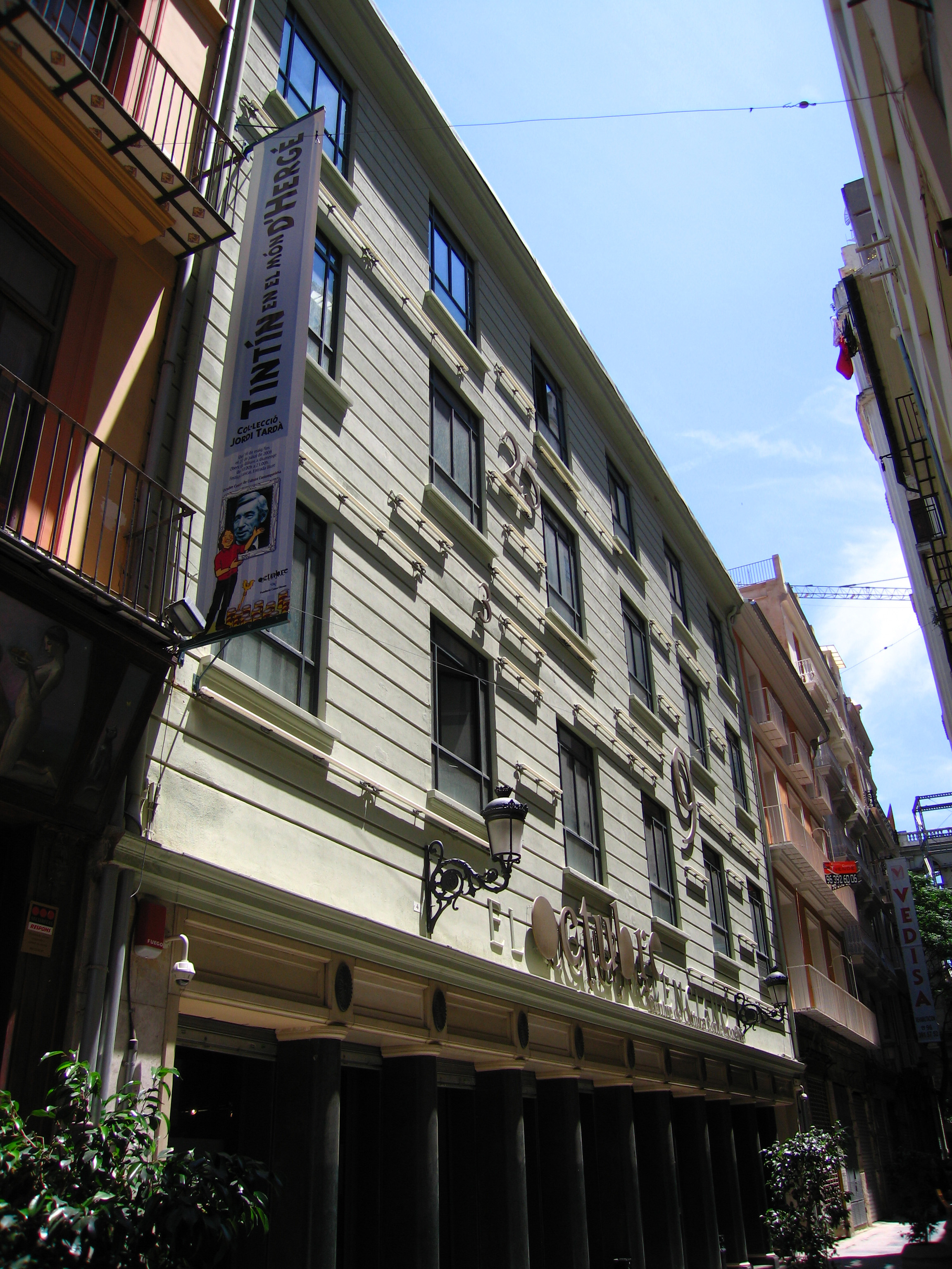 Fundació Octubre València